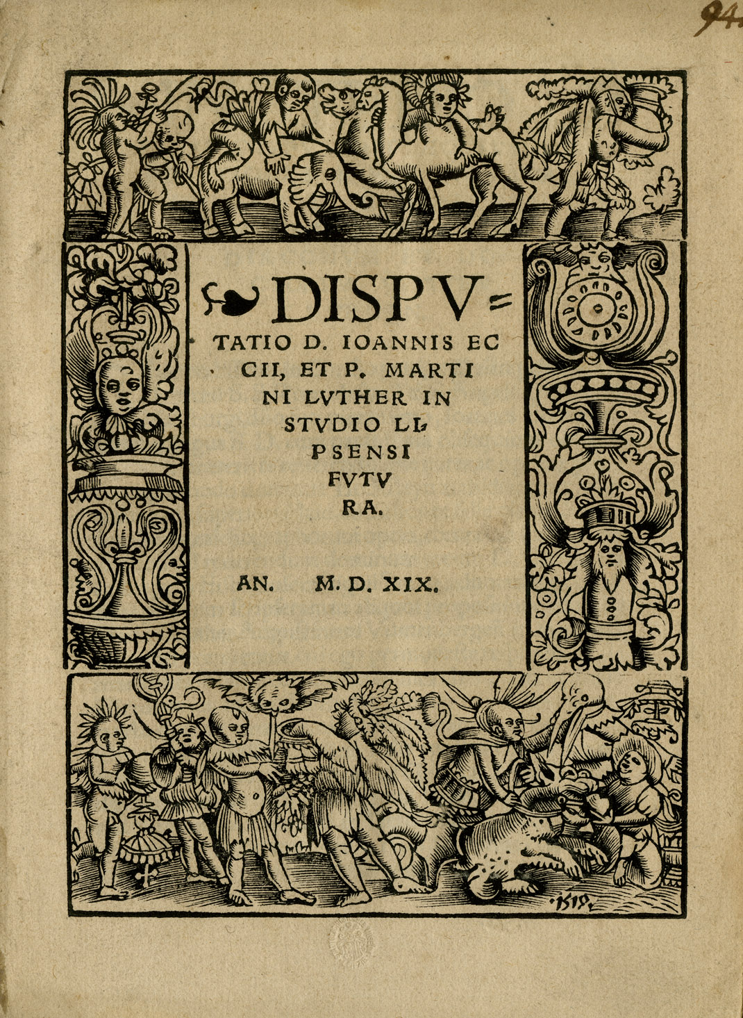 Titelblatt von "Disputatio d. Iohannis Eccii, et p. Martini Luther in studio Lipsensi futura", Leipzig 1519